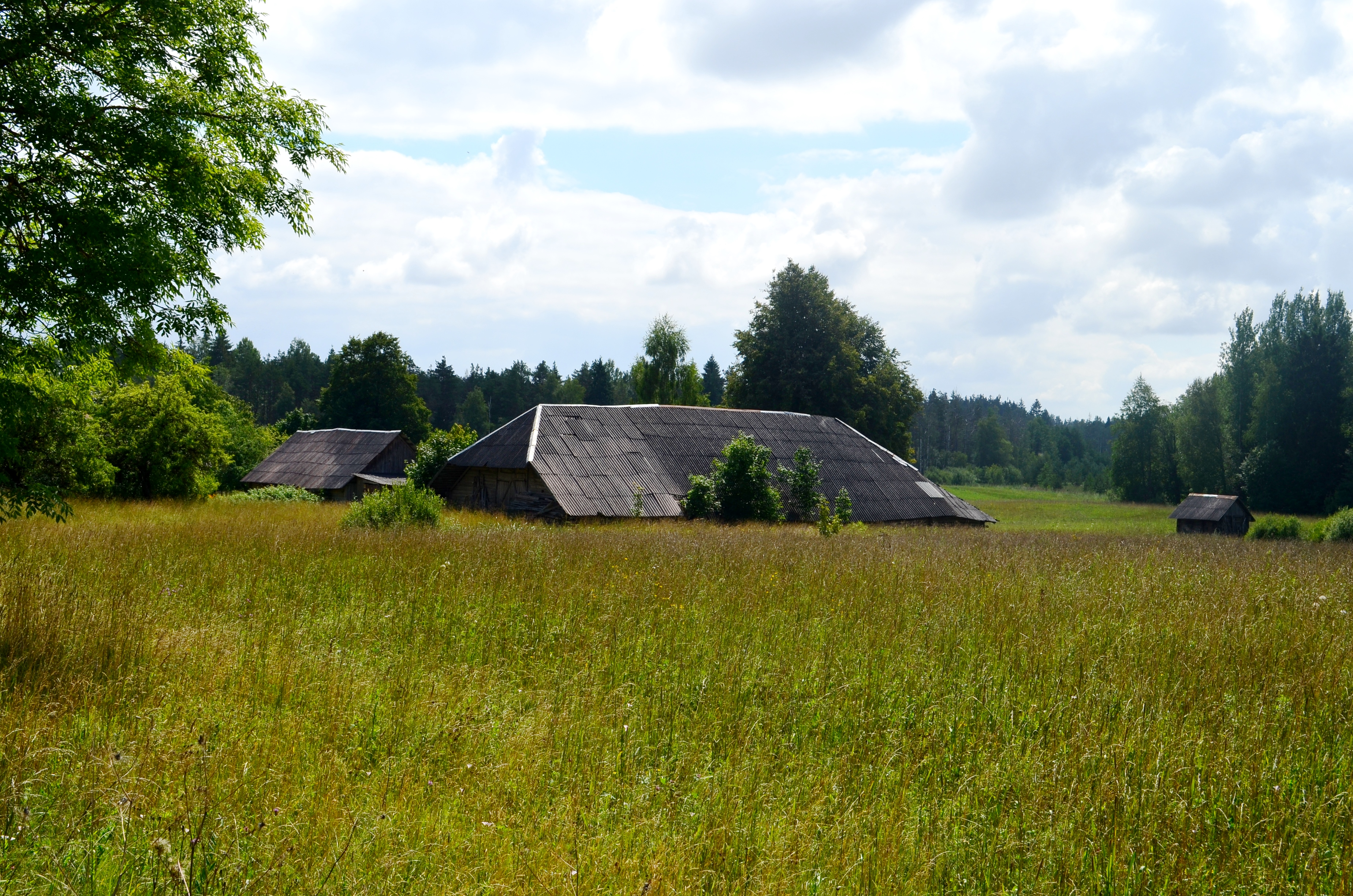 Pakapio k., Utenos raj.